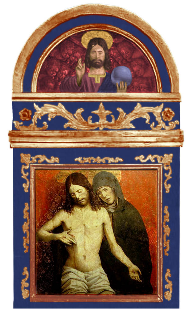 Spanzotti Giovanni Martino il Giovane (c.a. 1456-1528) Cristo in pietà sorretto dalla Madonna, Cristo Redentore benedicente - Tavola (dopo il 1475)